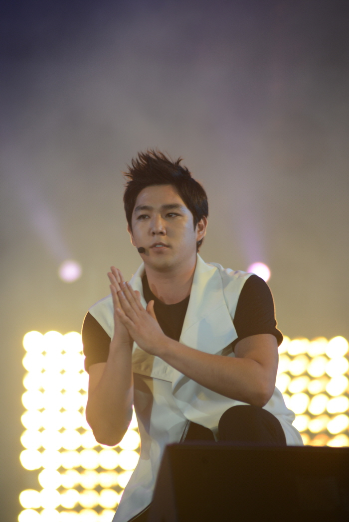 슈퍼주니어 강인